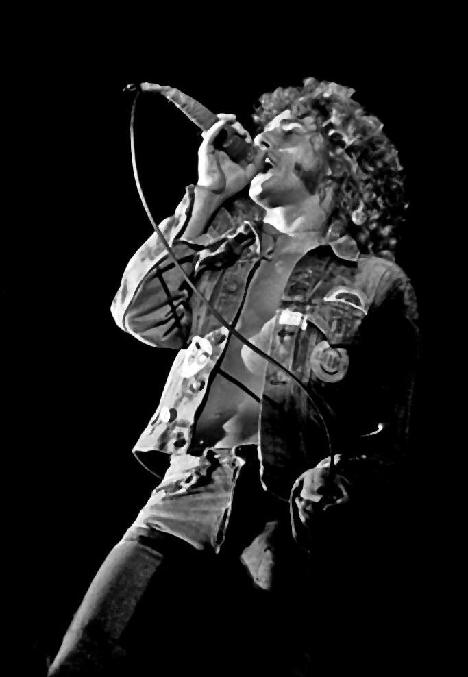 The Who, Ernst-Merck-Halle Hamburg, August 1972: Roger Daltrey